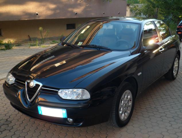 Alfa Romeo 156 Nera